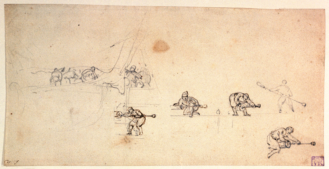 Laden von Schiffsgeschützen von außenbords